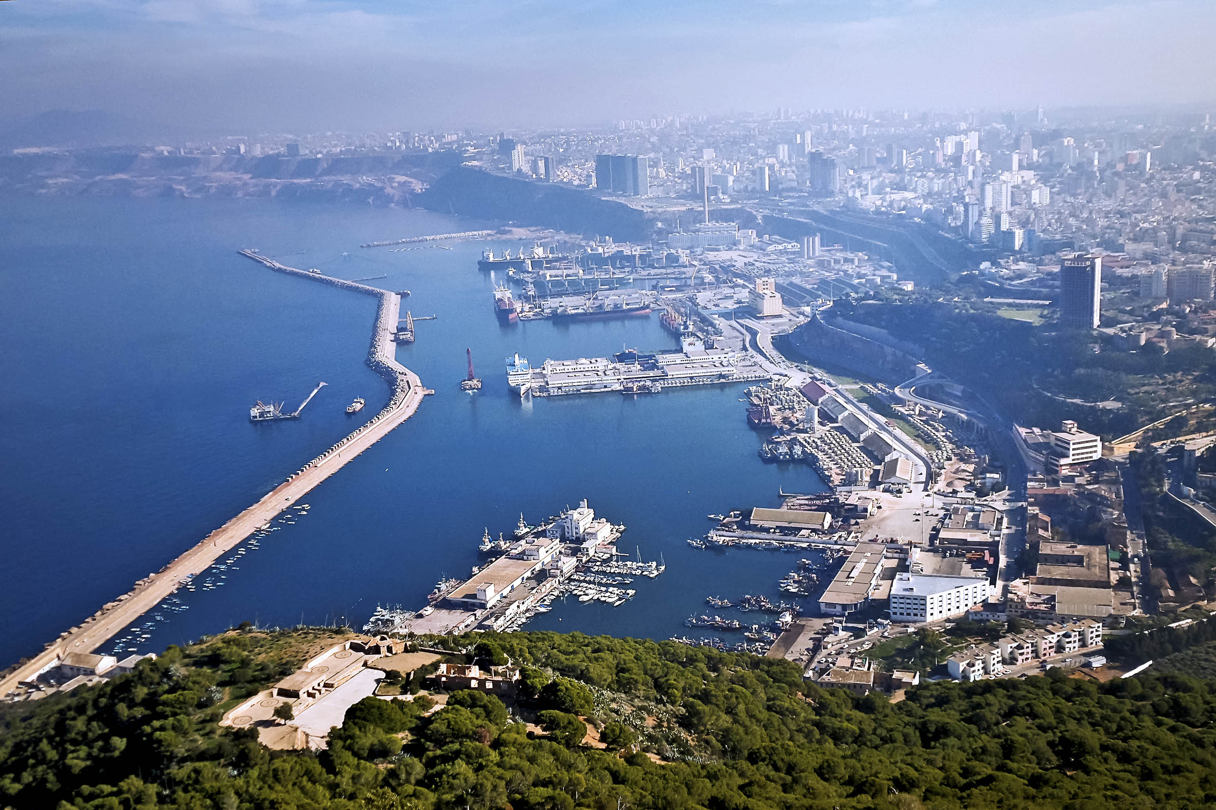 Oran - le port الميناء - وهران